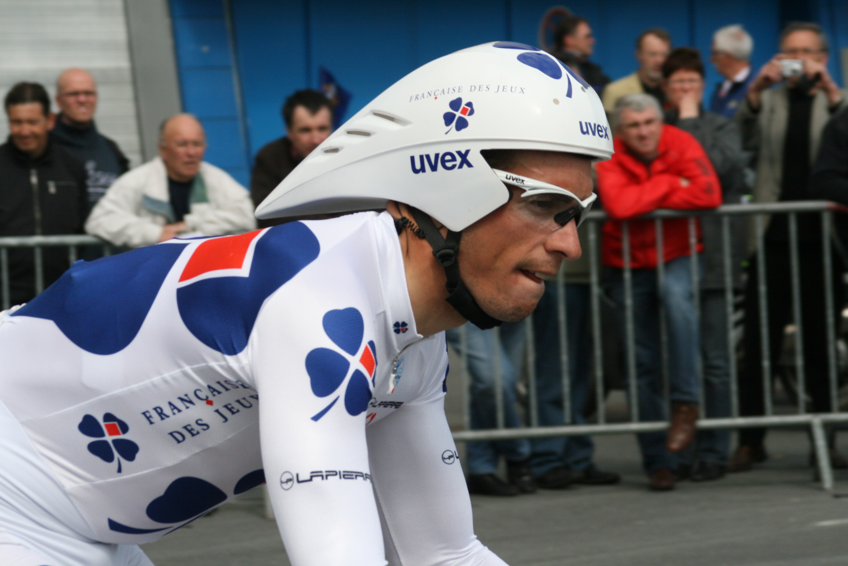 Sébastien Chavanel, lors des Quatre jours de Dunkerque 2009